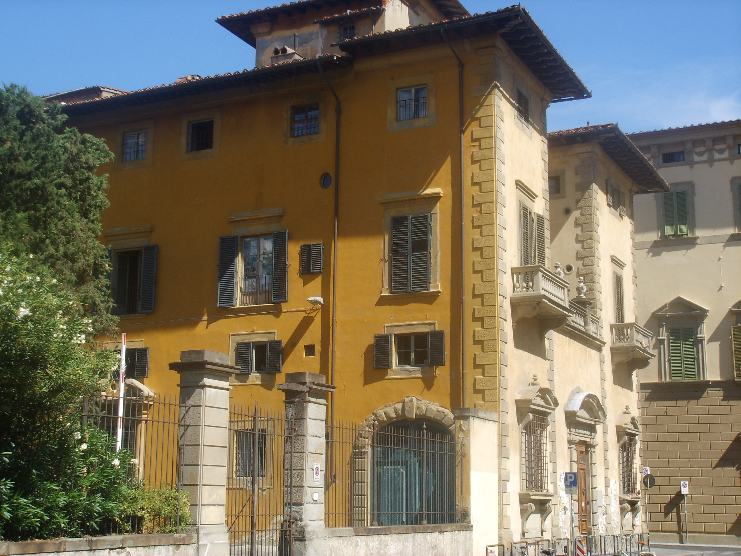 Palazzo di San Clemente in Florence, Italy